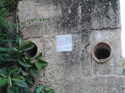 Porción de las "Murallas de Sevilla" en los Reales Alcázares (en los Jardines de Murillo junto al Barrio de Santa Cruz) Foto realizada y propiedad de comakut